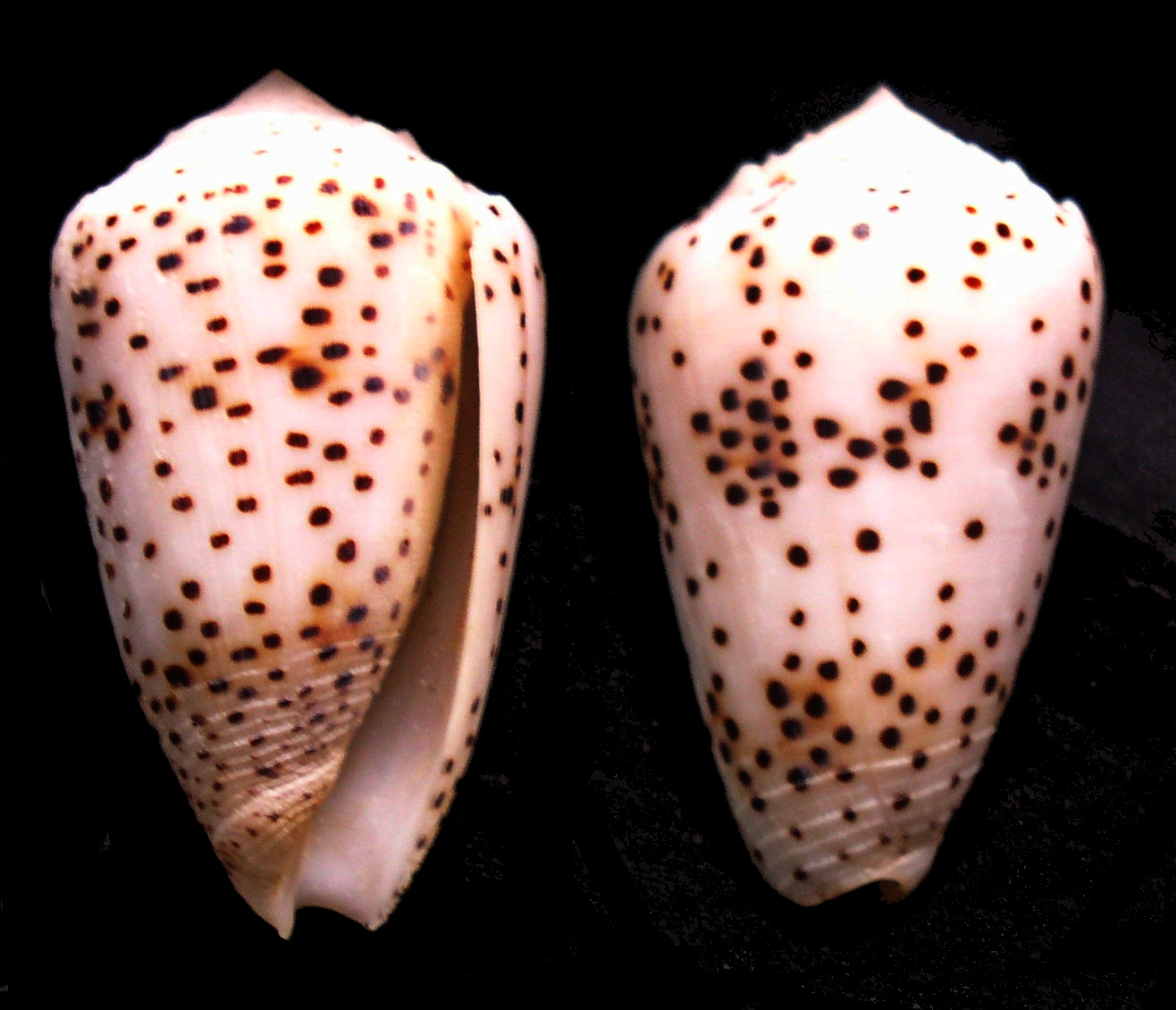 Flea-bite Cone - Conus pulicarius